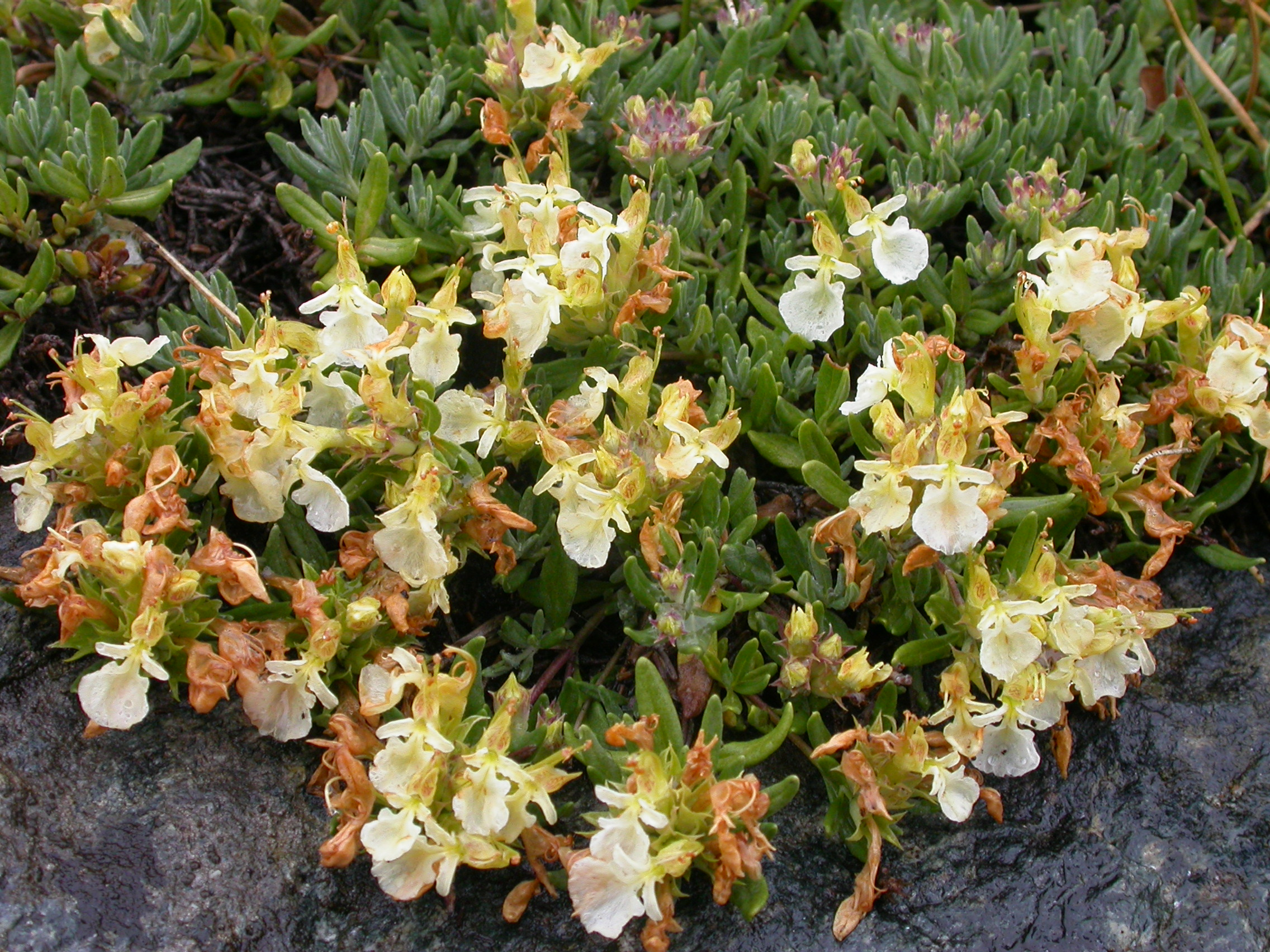 Teucrium montanum Zermatt, Riffelberg (Kanton Wallis, Switzerland), 2500 m Author: Barbara Studer – own photograph Date: 2.08.06